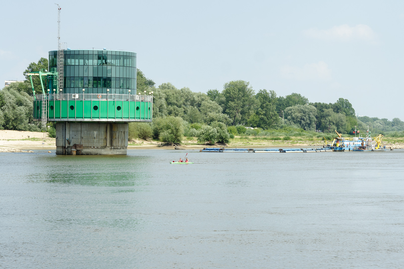 Ujęcie infiltracyjne (studnia) „Gruba Kaśka”, obok pogłębiarka (tzw. piaskarka) „Sawa”. This is a photography of Natura 2000 protected area with ID PLB140004